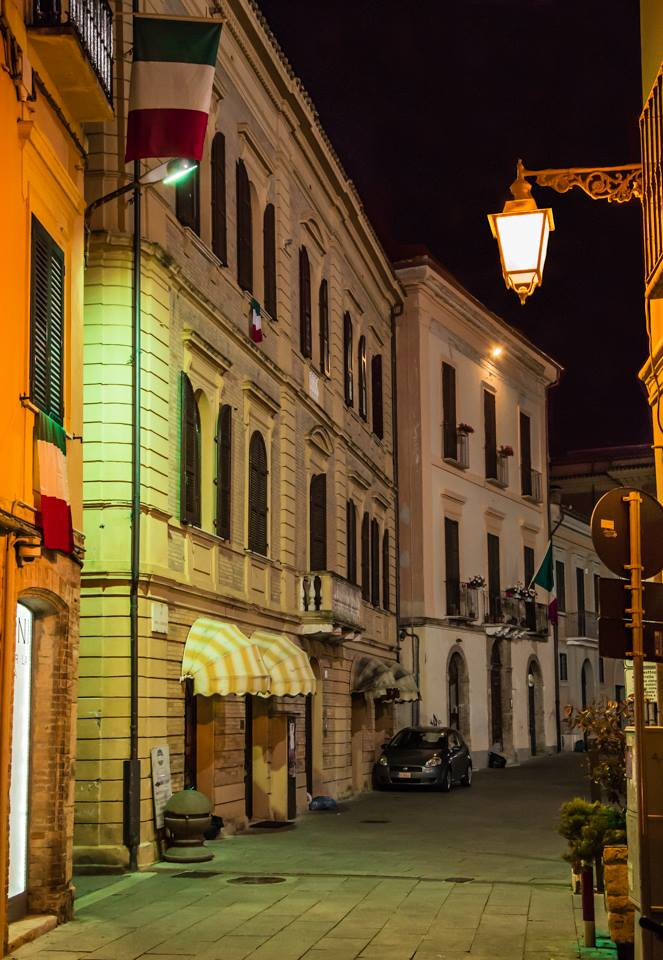 Scorcio in centro storico:da Via Getulio uno sguardo verso Piazza Sant'Anna